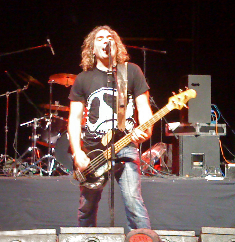 Fernando Madina, líder de Reincidentes, al frente de la banda en el concierto que la misma ofreció en marzo de 2011 en el Teatro Caupolicán de la ciudad de Santiago (Chile)